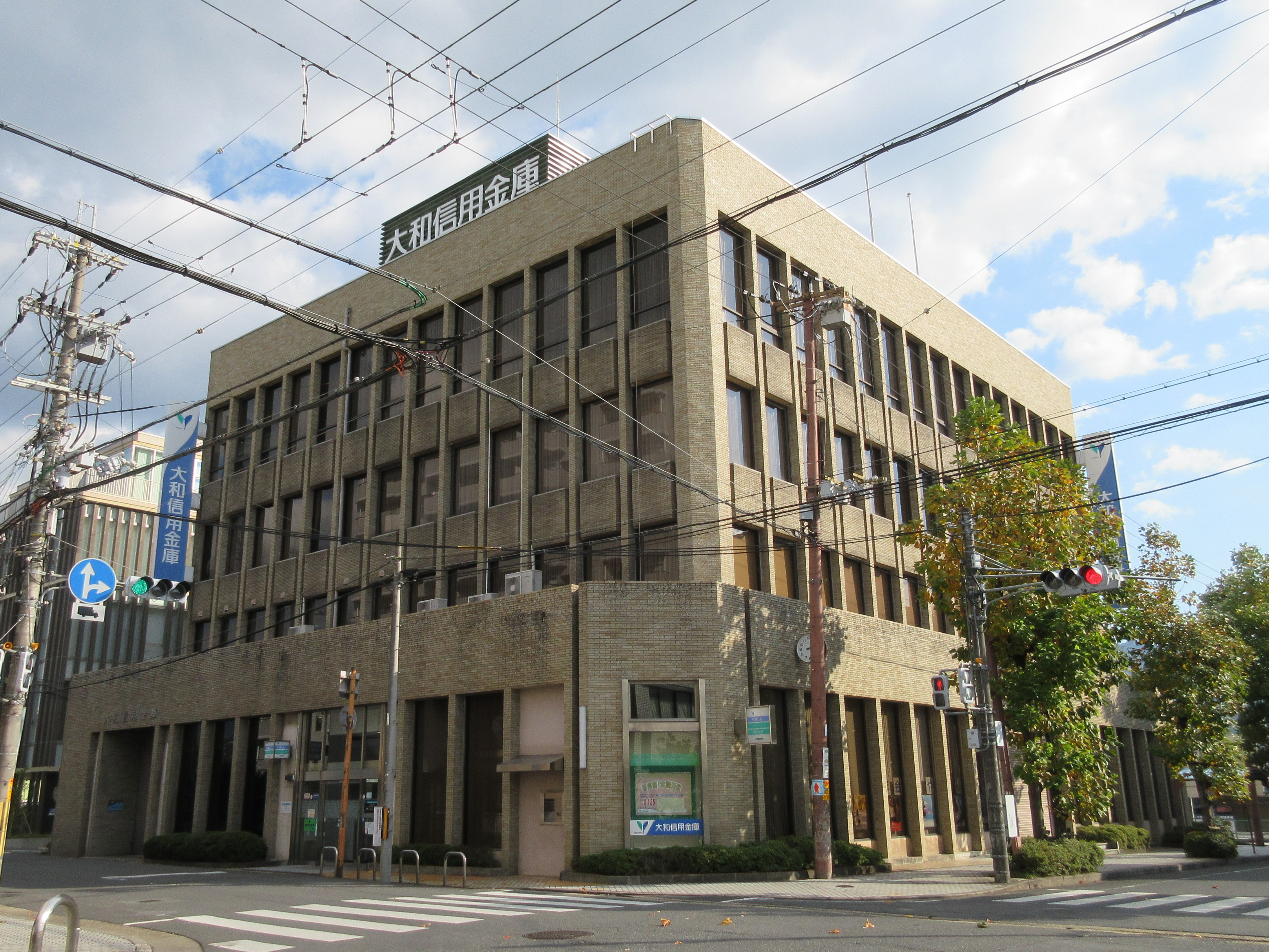 大和信用金庫本店